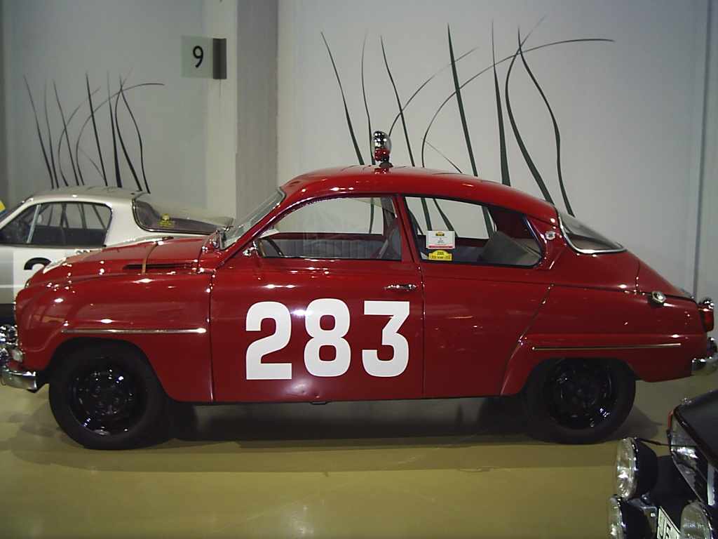 Kopia av den SAAB 96 som "Erik Carlsson på taket" körde i Monte Carlo-rallyt 1963. Bilen finns på SAAB-museet i Trollhättan. Fotograf:Tubaist (radera) (nuvarande) 2 juni 2005 kl.19.43 . . Tubaist (Diskussion) . . 1024x768 (239 820 bytes) (Kopia på den SAAB som "Erik Carlsson på taket" körde i Monte Carlo-rallyt 1963. Bilen finns på SAAB-muséet i Trollhättan. Fotograf:~~~ GFDL )